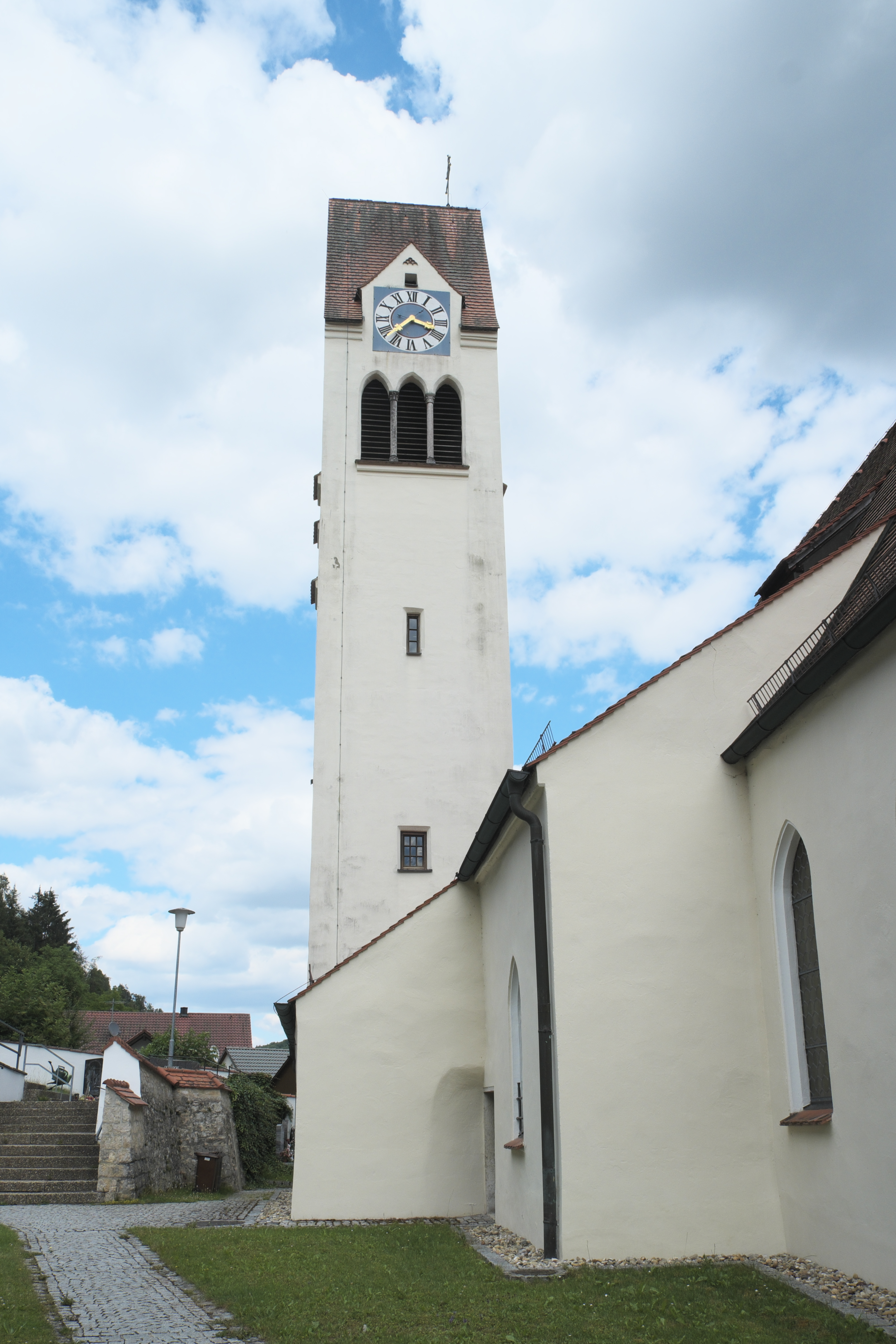 Ehemalige Johanniterkirche, heutige Pfarrkirche St. Johannes Baptist in Altmühlmünster (Riedenburg) im niederbayerischen Landkreis Kelheim (Bayern/Deutschland), Turm